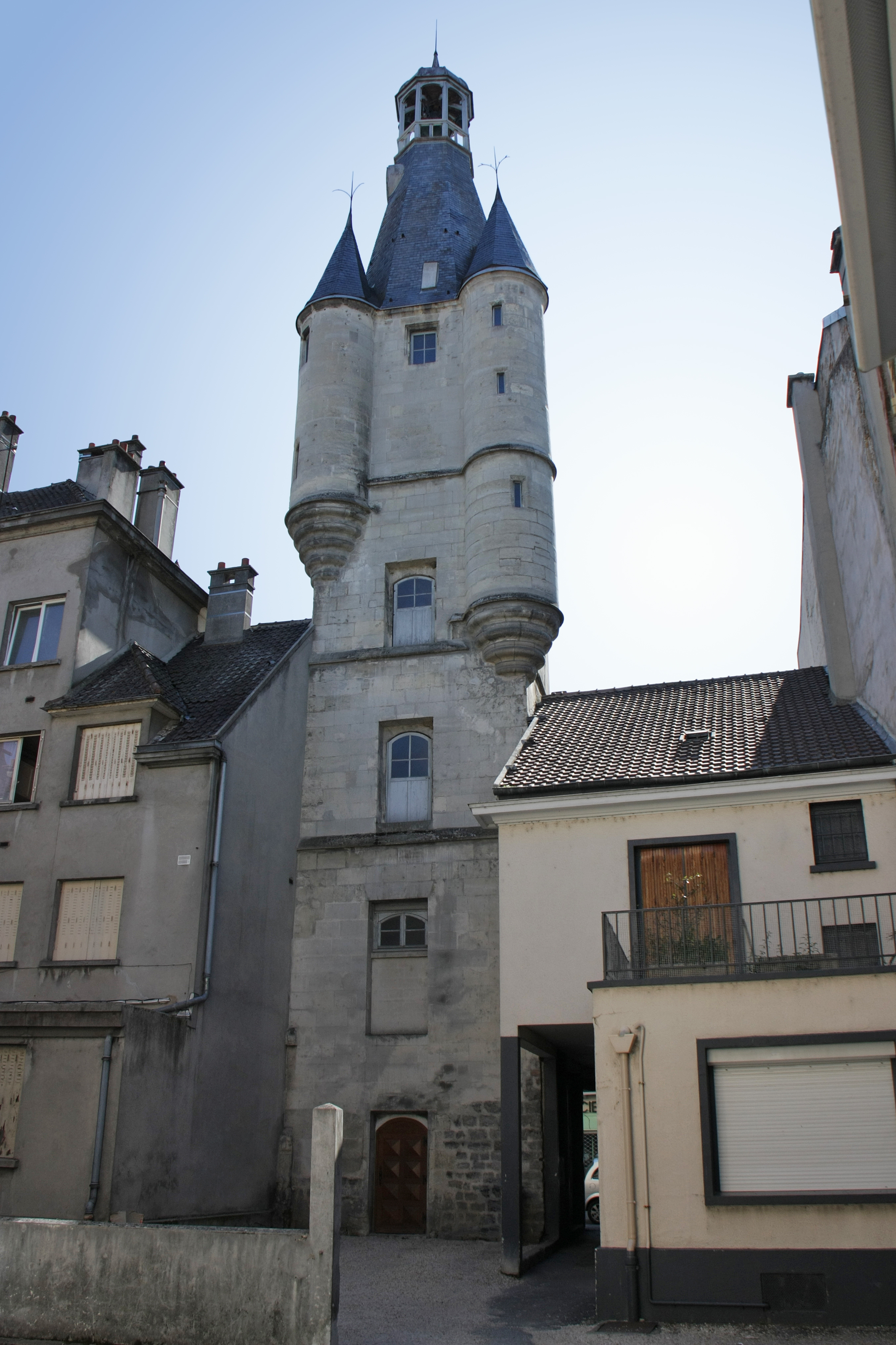 Tour Balhan à Château-Thierry. This image was improved or created by the Wikigraphists of the Graphic Lab (fr). You can propose images to clean up, improve, create or translate as well. azərbaycanca · বাংলা · català · čeština · Deutsch · Deutsch (Sie-Form) · Ελληνικά · English · Esperanto · español · suomi · français · עברית · magyar · Հայերեն · italiano · 한국어 · македонски · Bahasa Melayu · Plattdüütsch · Nederlands · occitan · polski · português · română · русский · slovenščina · svenska · татарча/tatarça · Türkçe · українська · 中文 · 中文（简体） · 中文（繁體） · Zazaki +/−